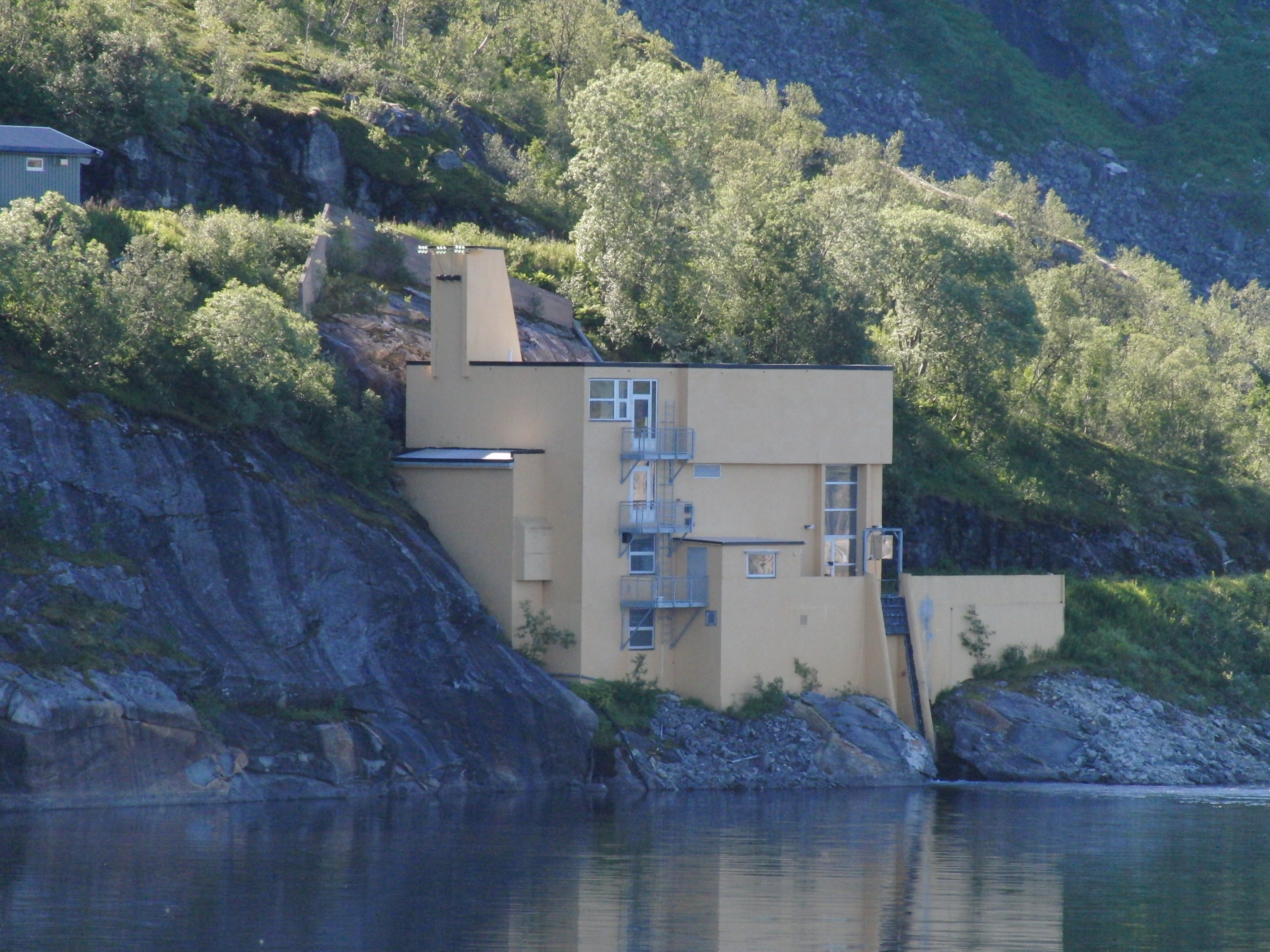 Forså kraftverk